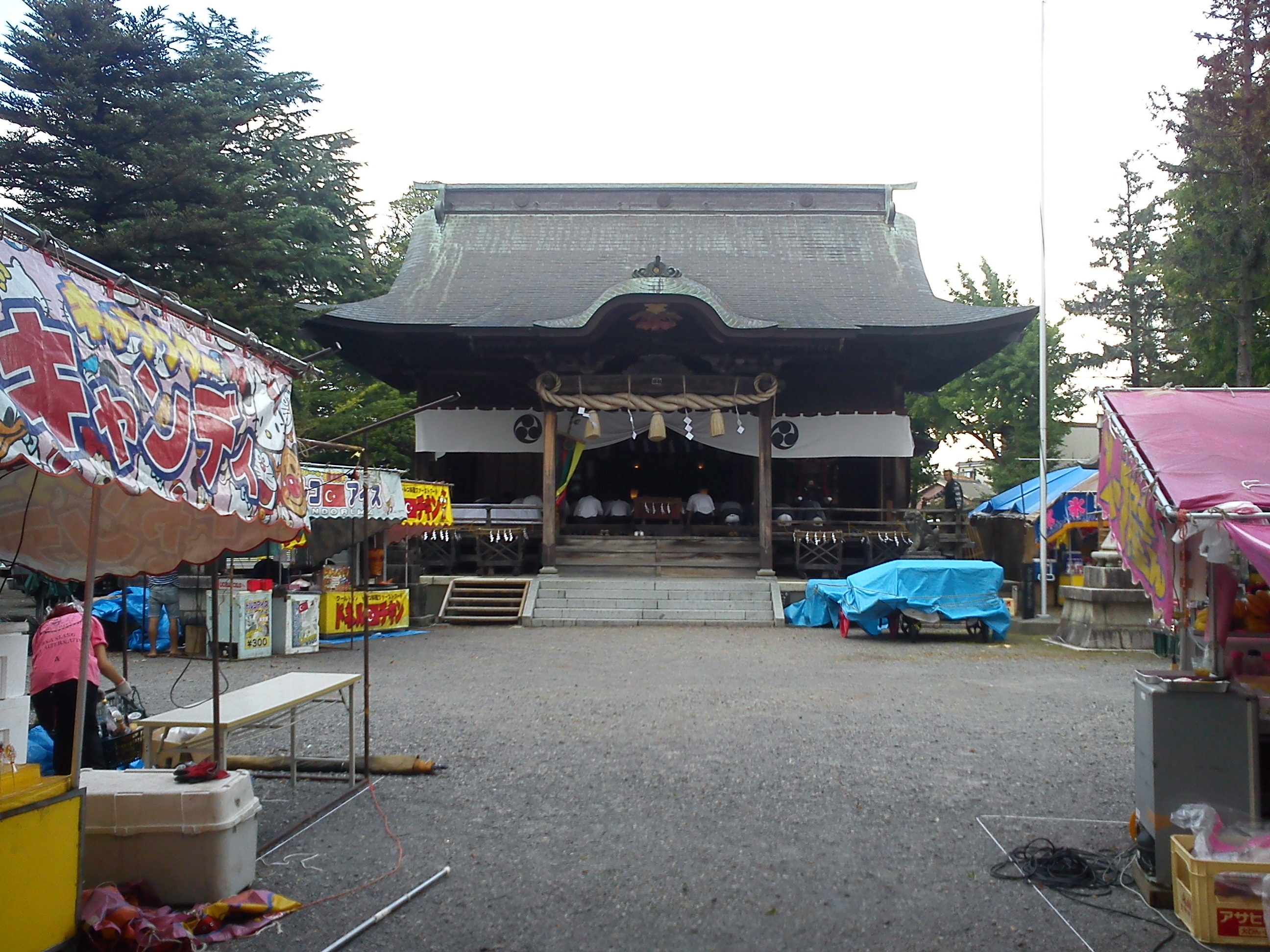 胎内市・熊野若宮神社